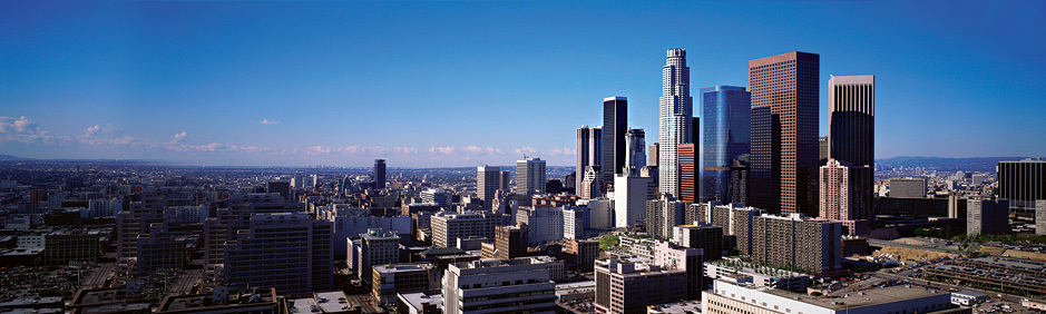 Los Angeles L.A